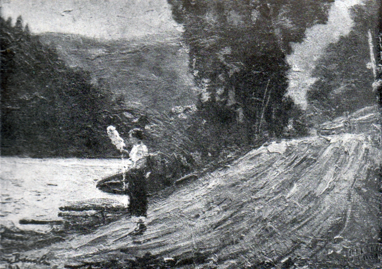 La gura Holditei